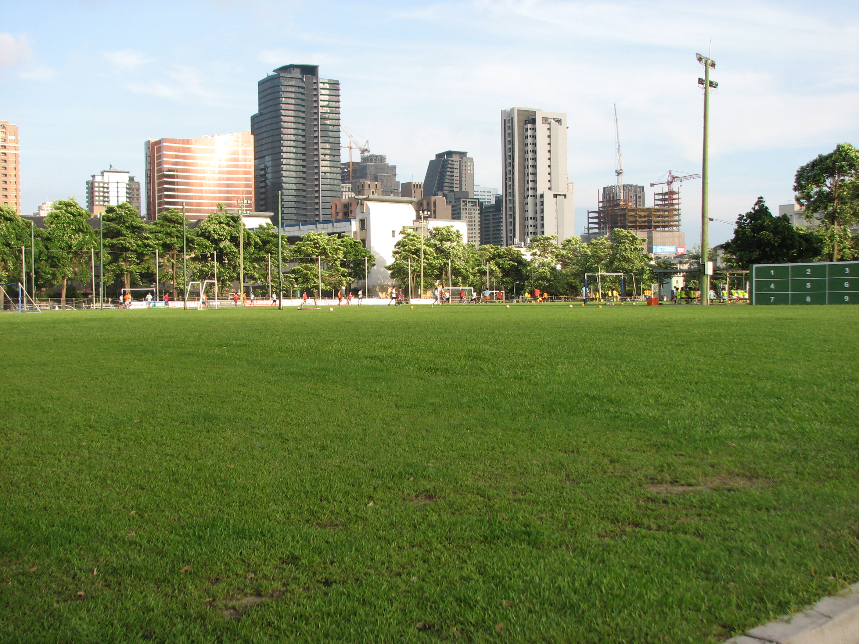 台中市足球場